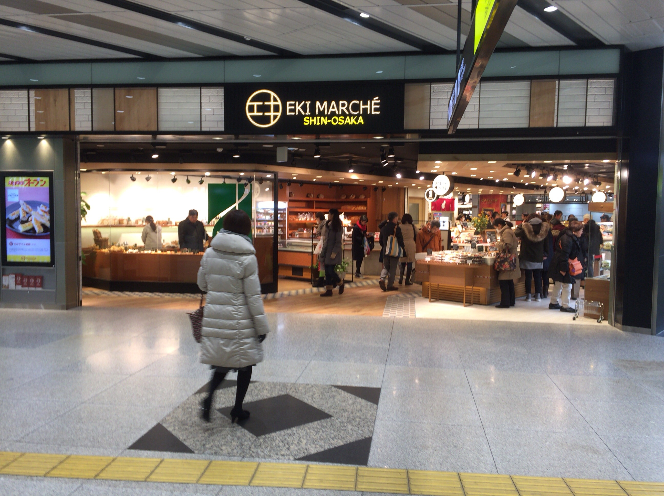 エキマルシェ新大阪